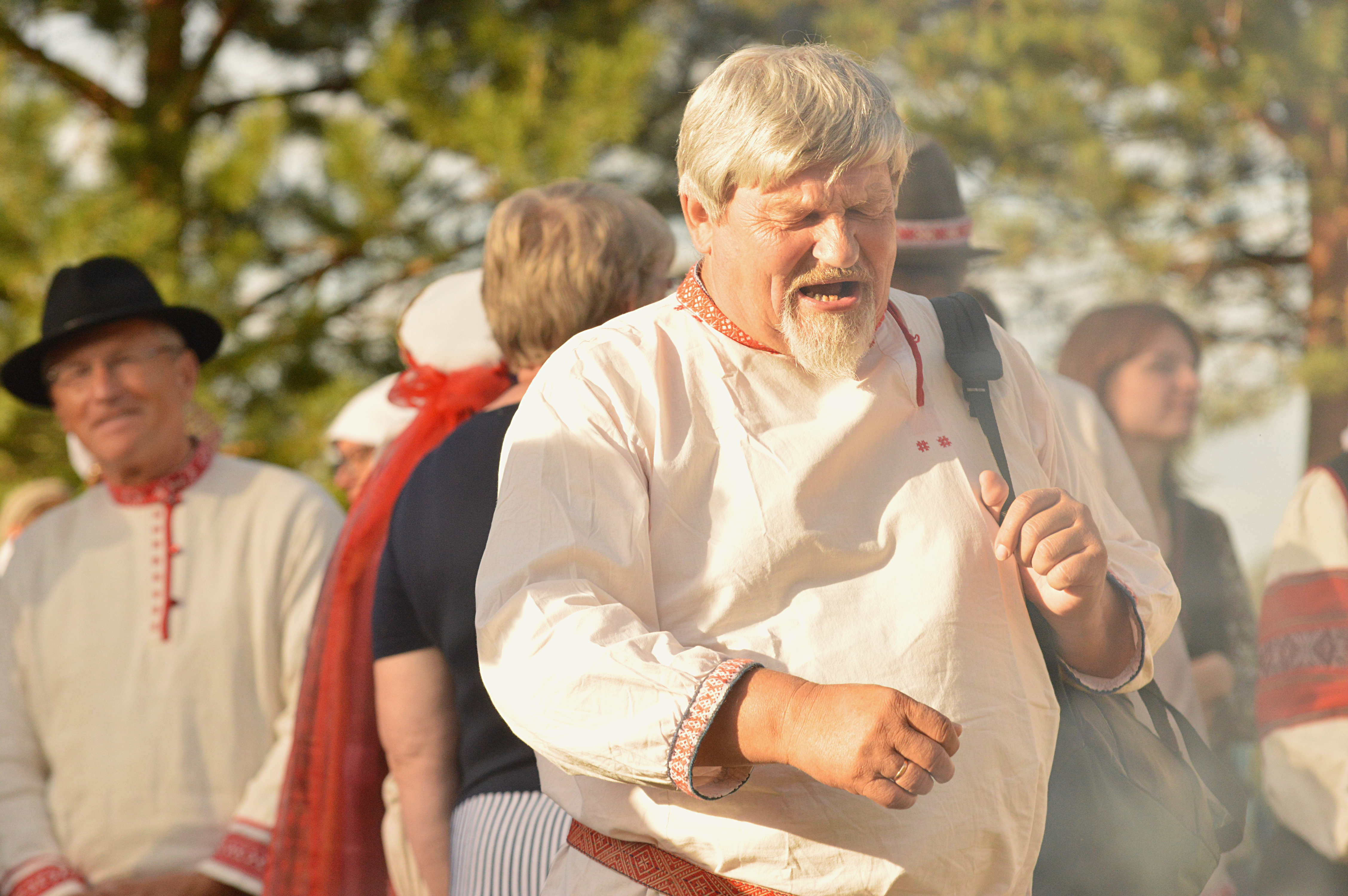 Seto kultuuri festival Radajal.